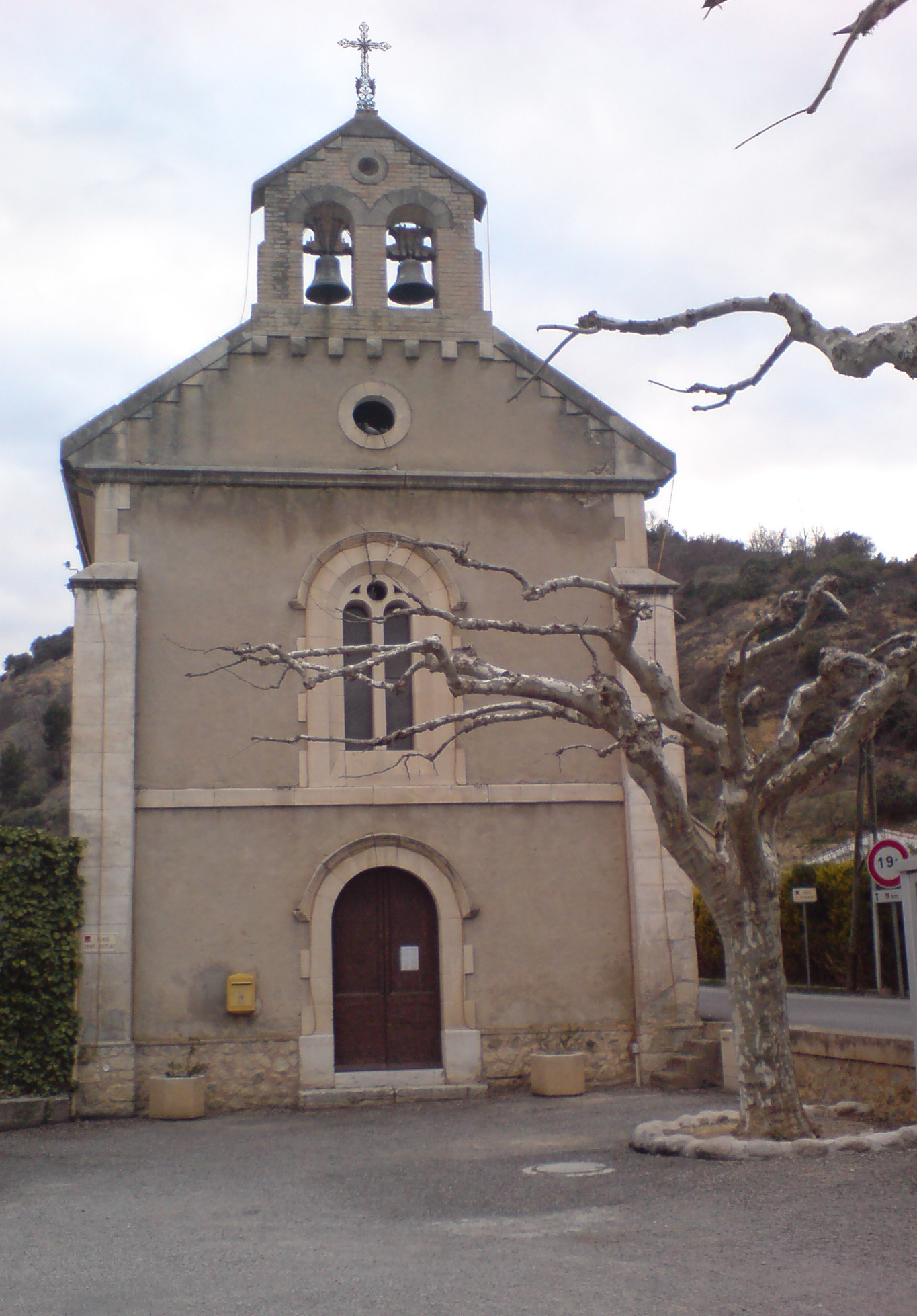 Information Église paroissiale de Bras-d'Asse Alpes-de-Haute-Provence) Date: voir métadonnées